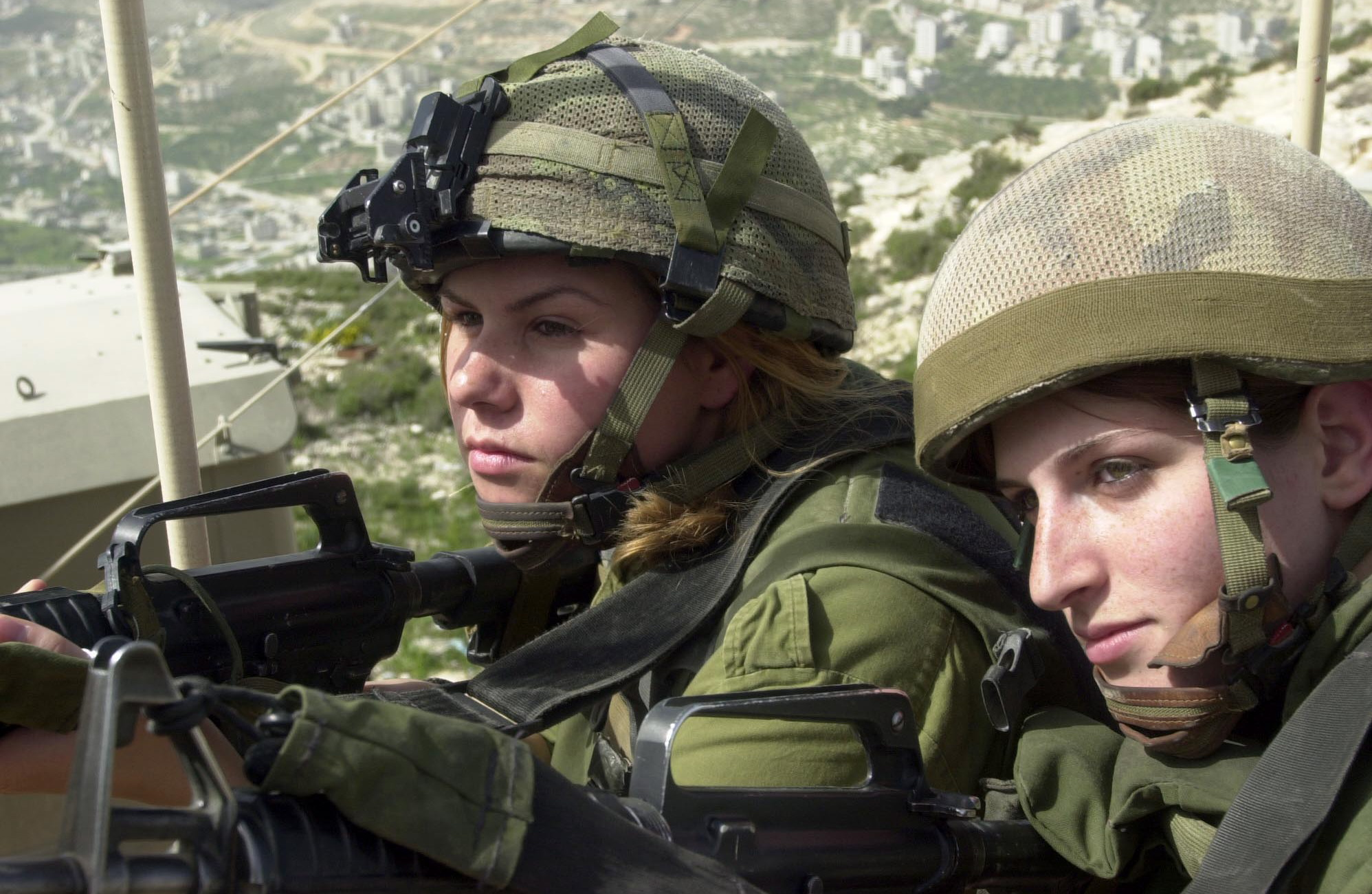 April 14, 2002. Women from the Paratroopers Brigade serving as lookouts in Nablus during Operation Defensive Shield. חיילות מחטיבת הצנחנים משרתות כתצפיתניות בשכם במהלך מבצע חומת מגן.